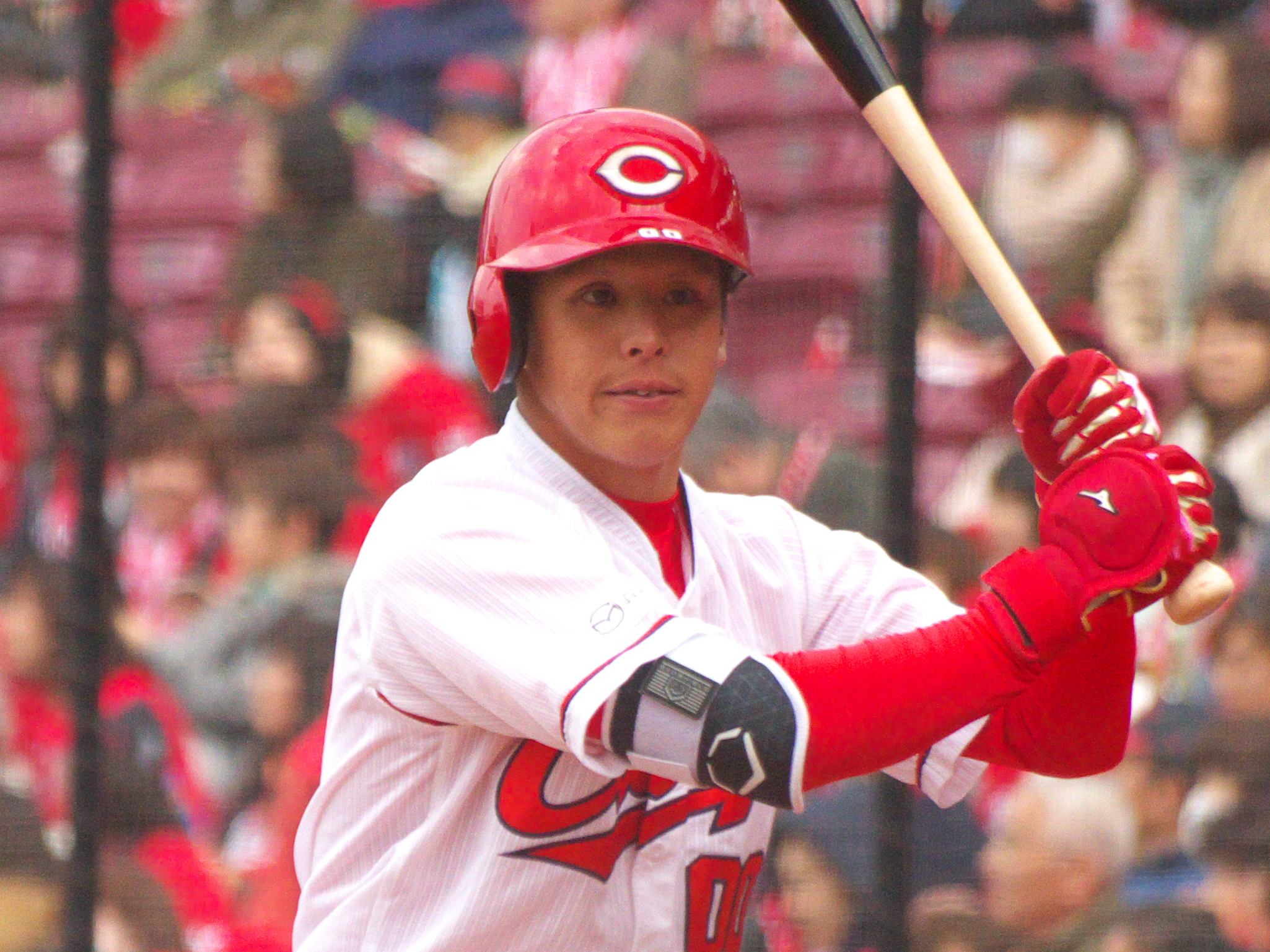 広島東洋カープ曽根海成